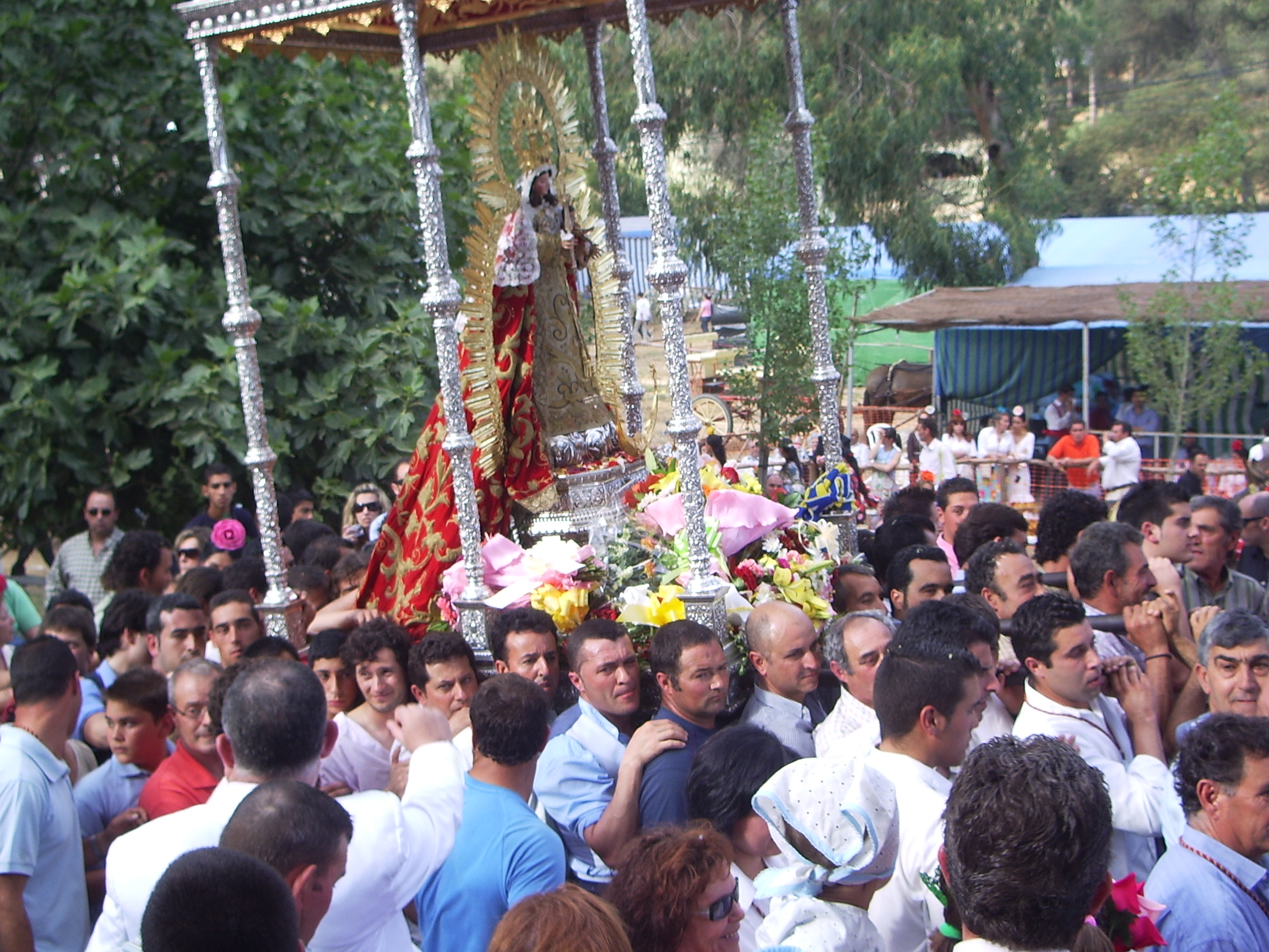 Romería de la Virgen de Montemayor de Moguer, 2009